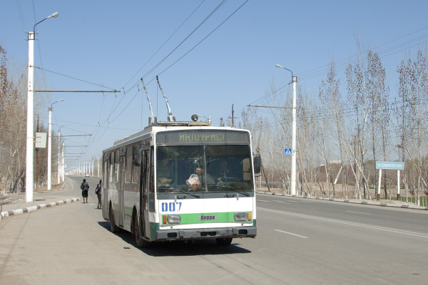 Škoda 14TrM 007 in Oʻzbekiston